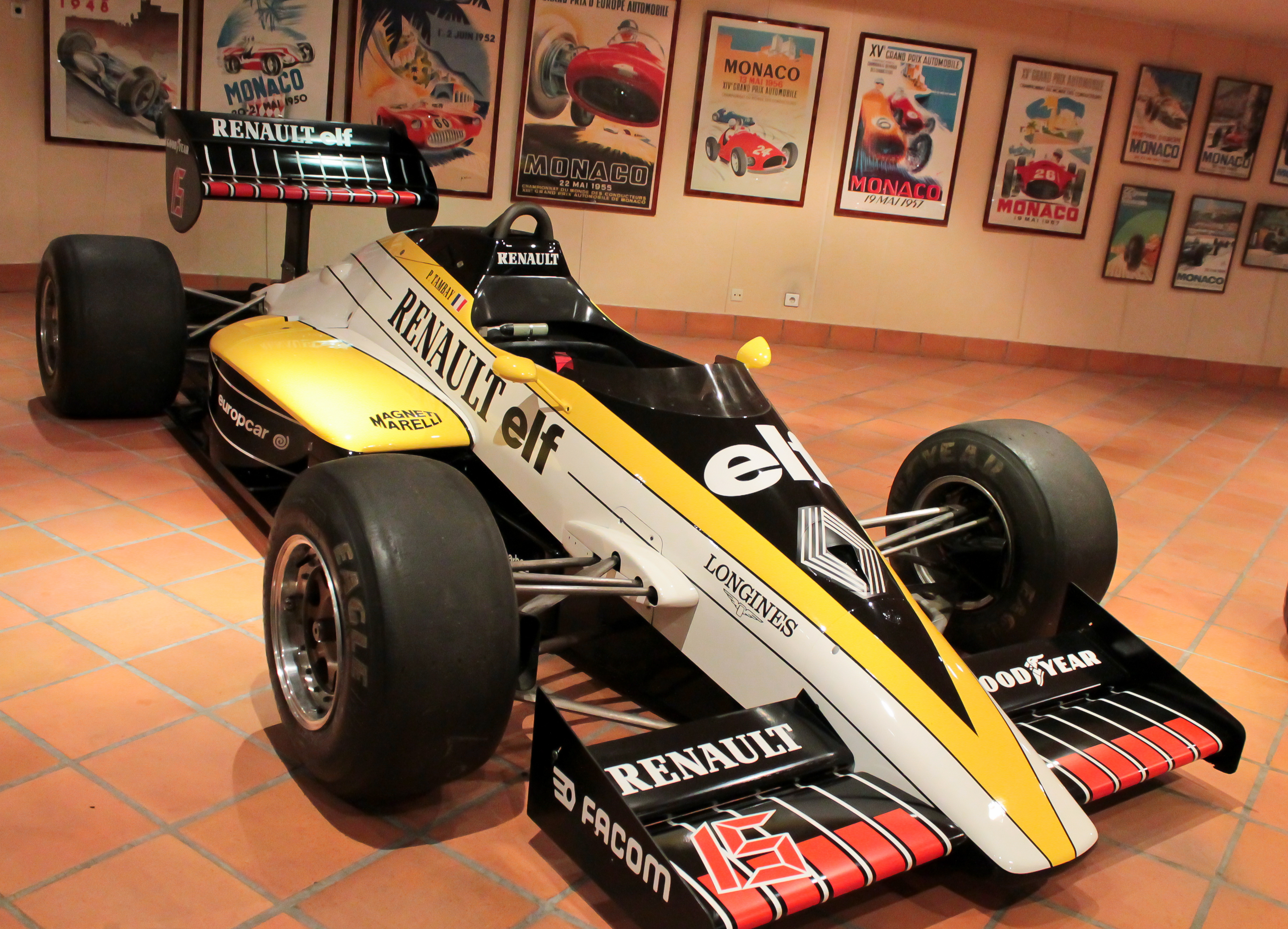 Photographie de la Renault RE60 de Formule 1 1985, pilotée par Patrick Tambay, dans un musée.